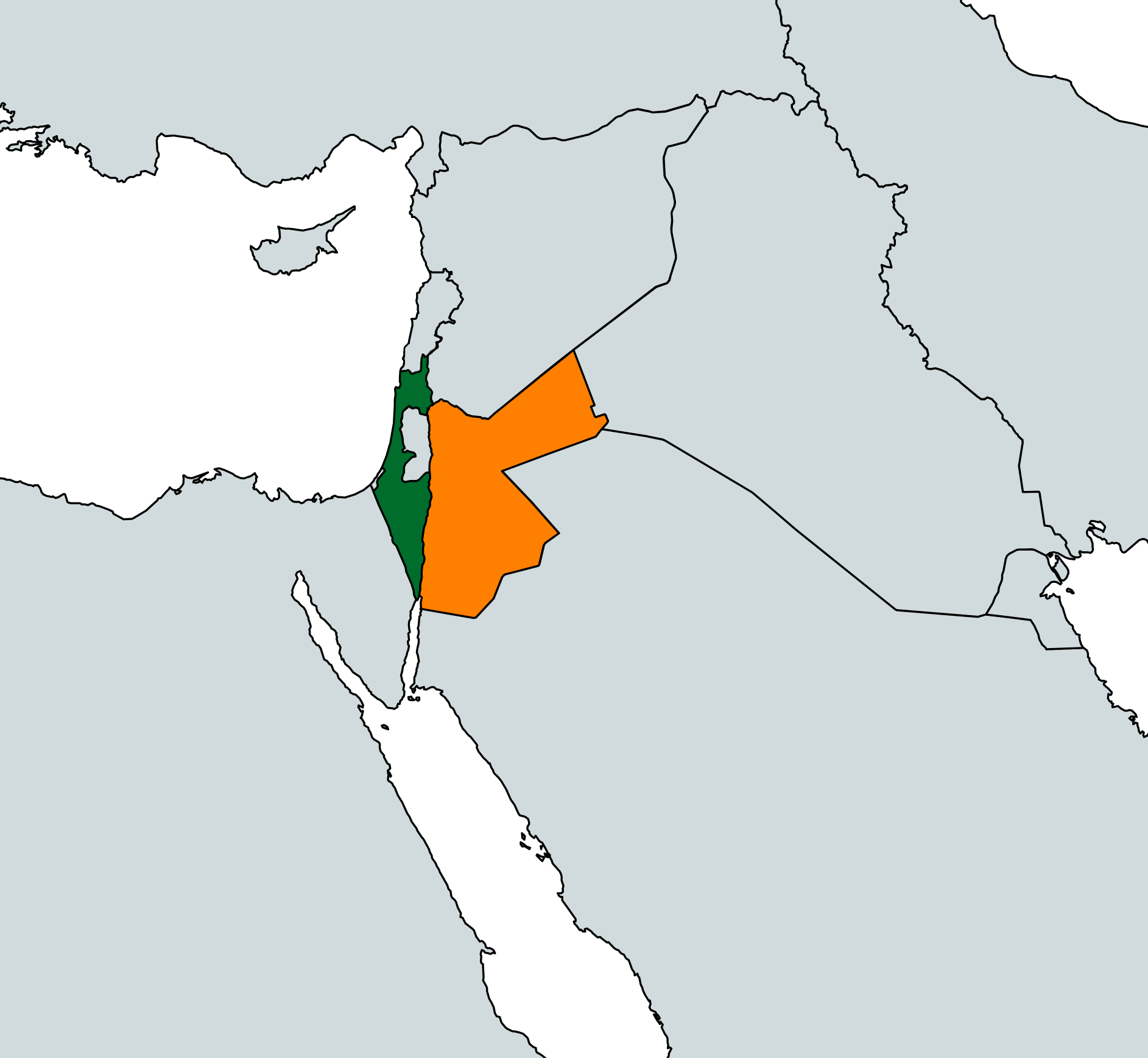 Locator